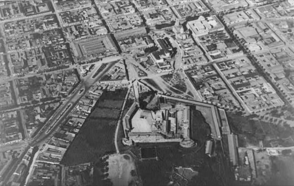 Foto aérea de la Ciudad de Guatemala en la década de 1930. En primer plano, el Fuerte de San José Buena Vista.